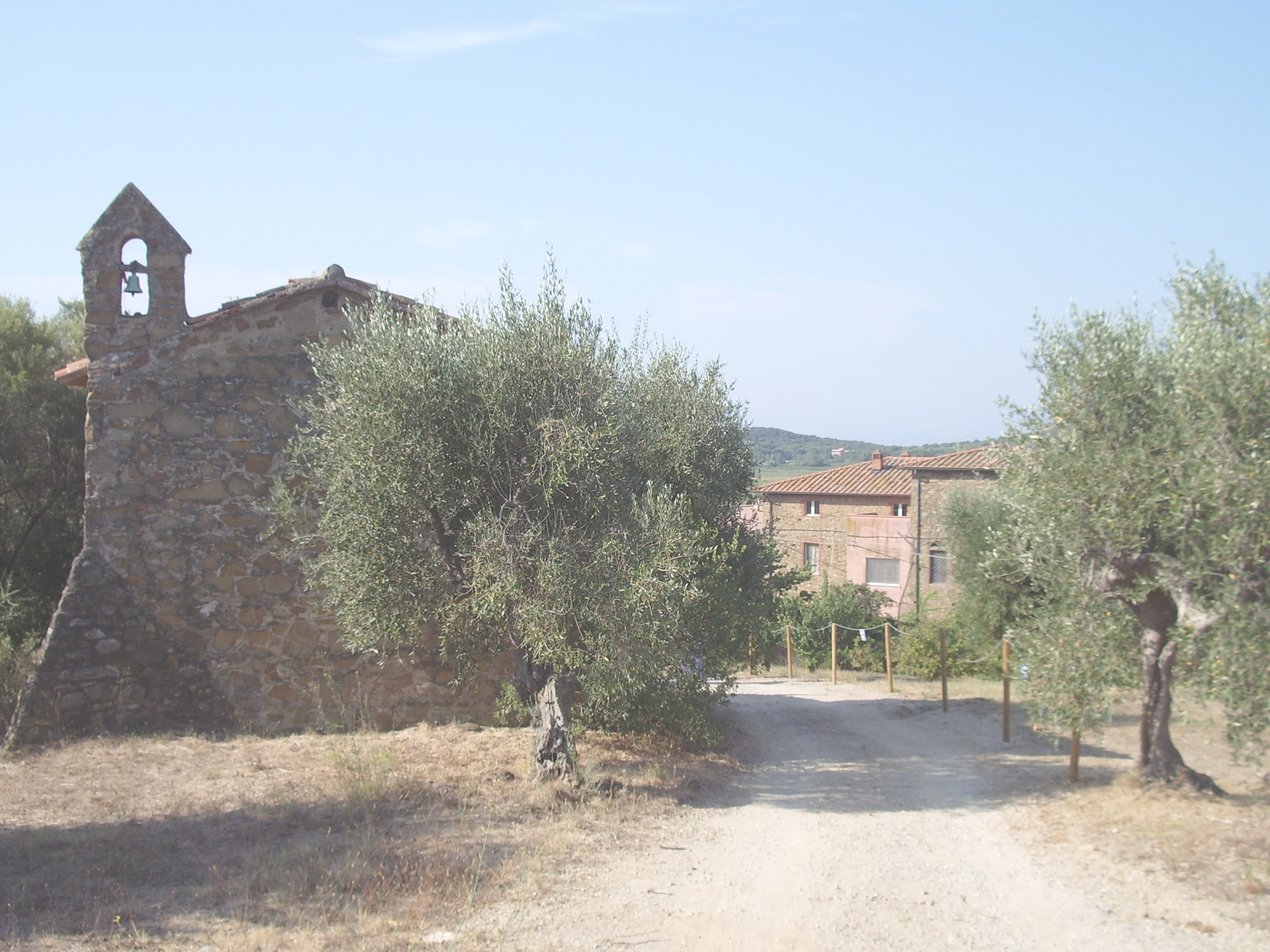 L'abside della cappella di Santa Rita a Pian di Rocca e, sullo sfondo, parziale veduta della Fattoria di Pian di Rocca presso Castiglione della Pescaia